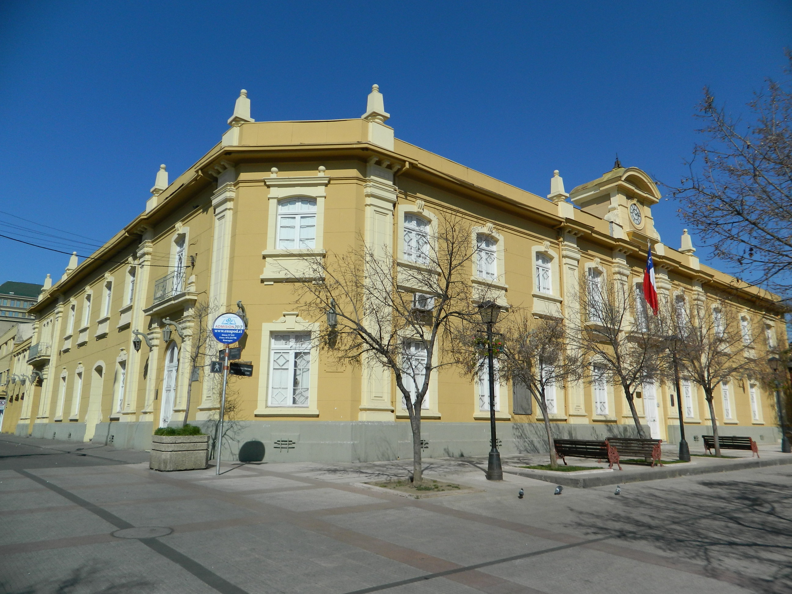 Edificio construido entre los años 1887 y 1889. En un principio este edificio era de estilo neoclásico austero, pero en 1930 fue remodelado, resultando una construcción de 2 pisos, de fachada continua y un gran reloj sobre la entrada principal. Posee 3 patios interiores. Inicialmente funcionaba como Intendencia de la la nueva Provincia (fundada en 1883), pero actualmente se desempeña como Gobernación Provincial. This is a photo of a national monument in Chile: 641